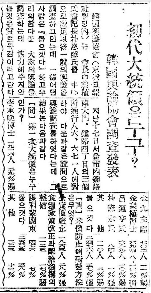 초대 대통령(初代大統領)은 누구? 한국여론협회 조사 발표 (韓國輿論協會調査發表) : 이승만 1916표 (29%), 김구 702표 (11%), 김규식 694표 (10%), 여운형 689표 (10%), 박헌영 84표 (1%), 기타 110표 (2%)